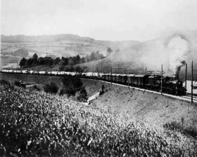 Kniezug Burgdorf-Thun-Bahn (BTB) mit Drehstromlokomotive Ce 4/4 und Dampflokomotive Ed 4/5 der Emmentalbahn (EB) zwischen Walkringen und Biglen. Die Fahrzeit von Burgdorf nach Thun betrug 2 1/2 Stunden, benötigt wurden 9 Mann Fahrpersonal.